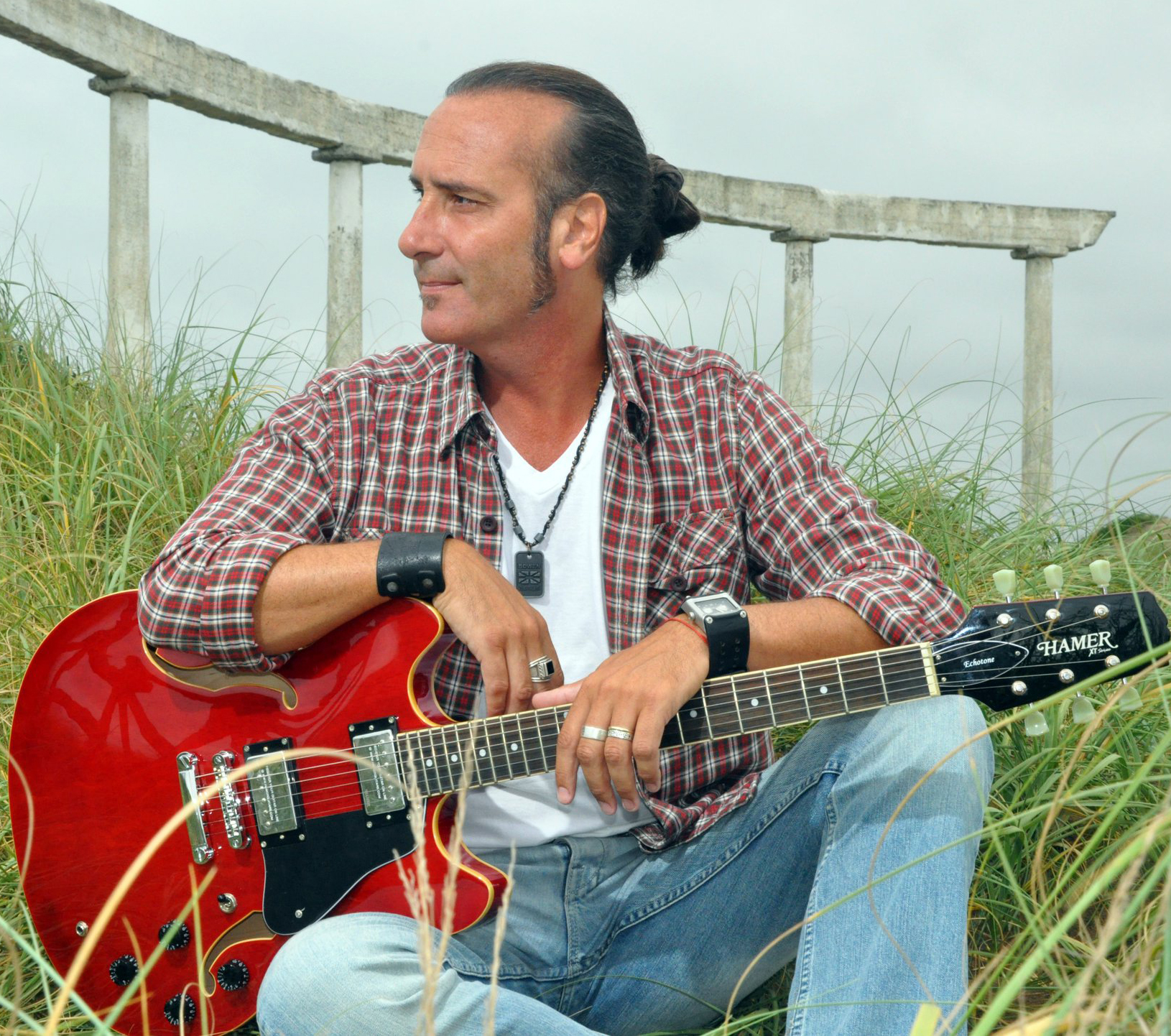 Manuel Wirzt